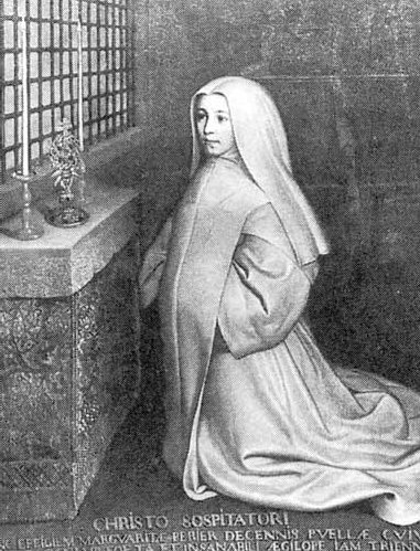 Portrait de Marguerite Perier